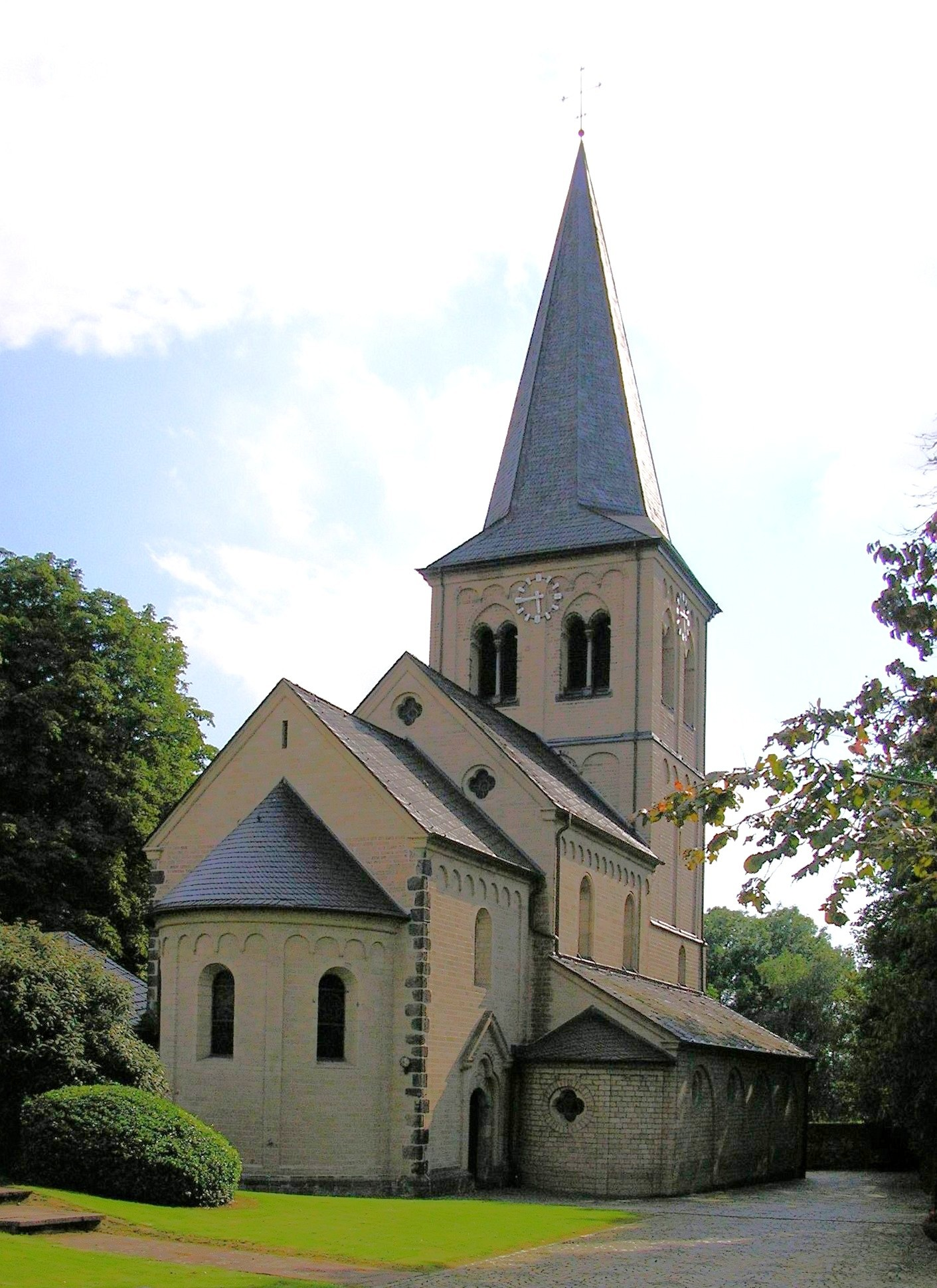 Himmelgeist, romanische Pfarrkirche St. Nikolaus